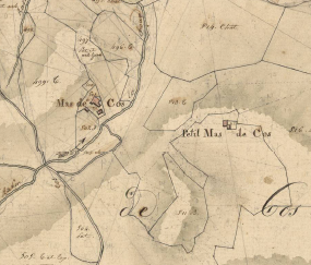 Cos, del Tec, en el Cadastre napoleònic del 1812 (Arxius Departamentals dels Pirineus Orientals)